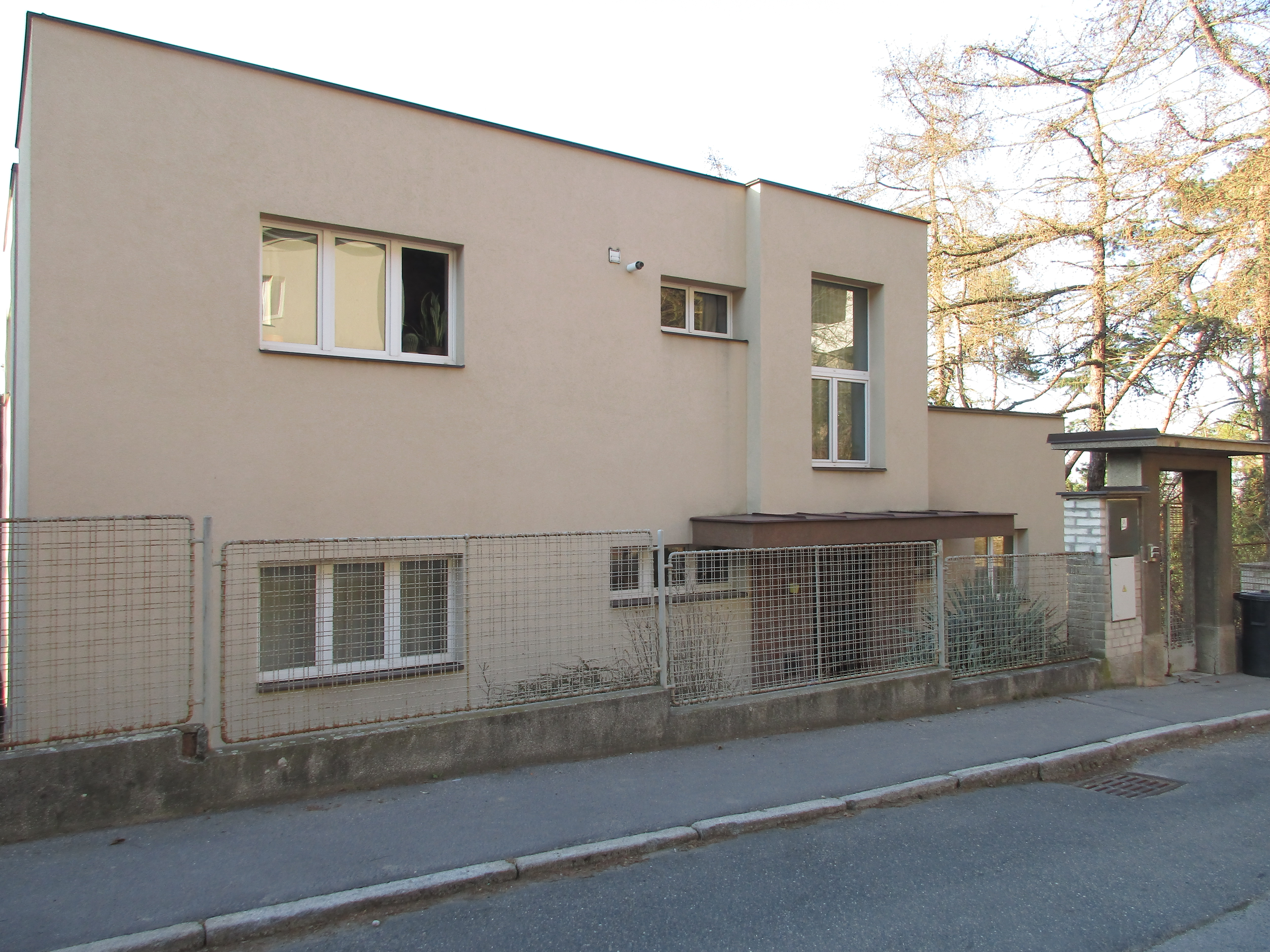 Pod Habrovou 184/15, Praha 5-Hlubočepy